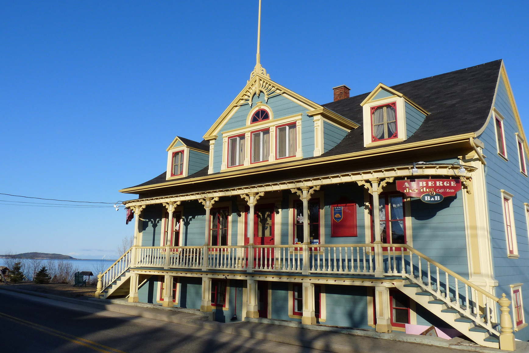 Auberge dans la municipalité de Kamouraska au Bas-Saint-Laurent (Québec)